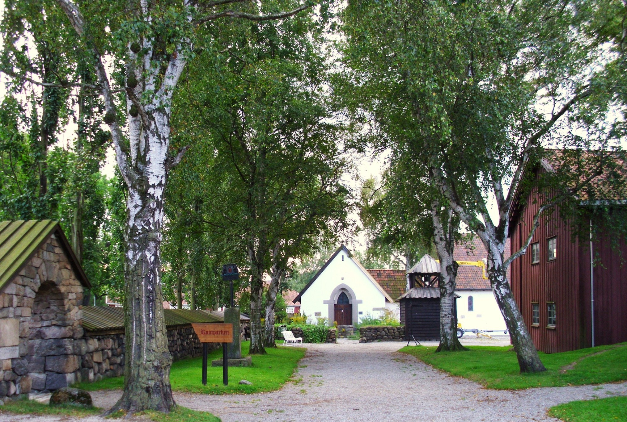 Blick vom Haupteingang auf den Museumspark Borgarsyssel in Sarpsborg, Sitz des Regionalmuseums Østfold und des Stadtmuseums Sarpsborg auf dem historischen Gelände der Gründung der Stadt Borg (heute Sarpsborg) im Jahr 1016